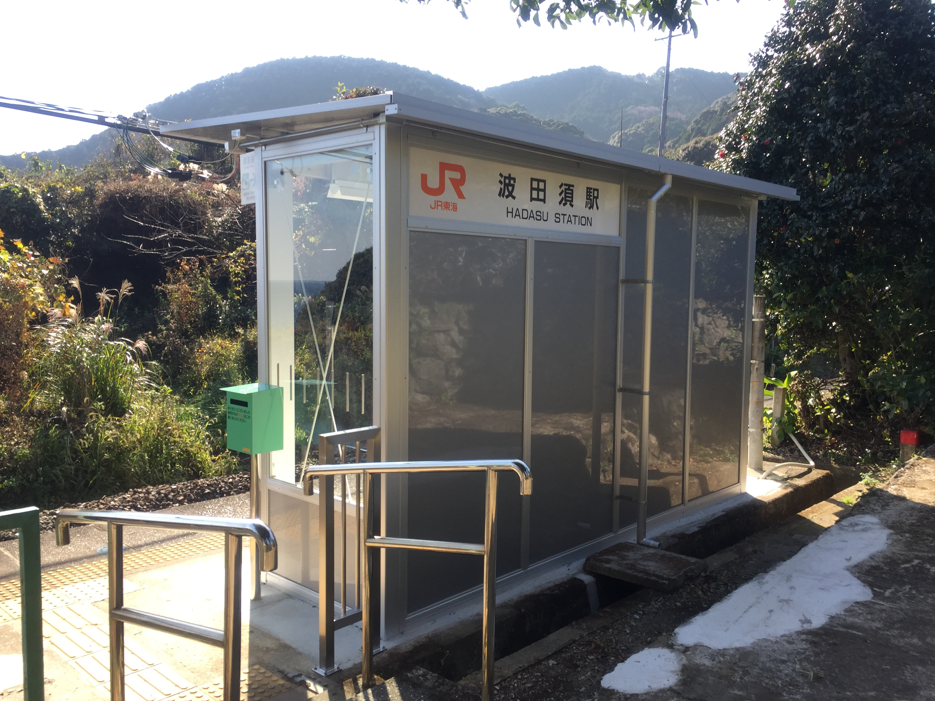 2016年からの波田須駅駅舎